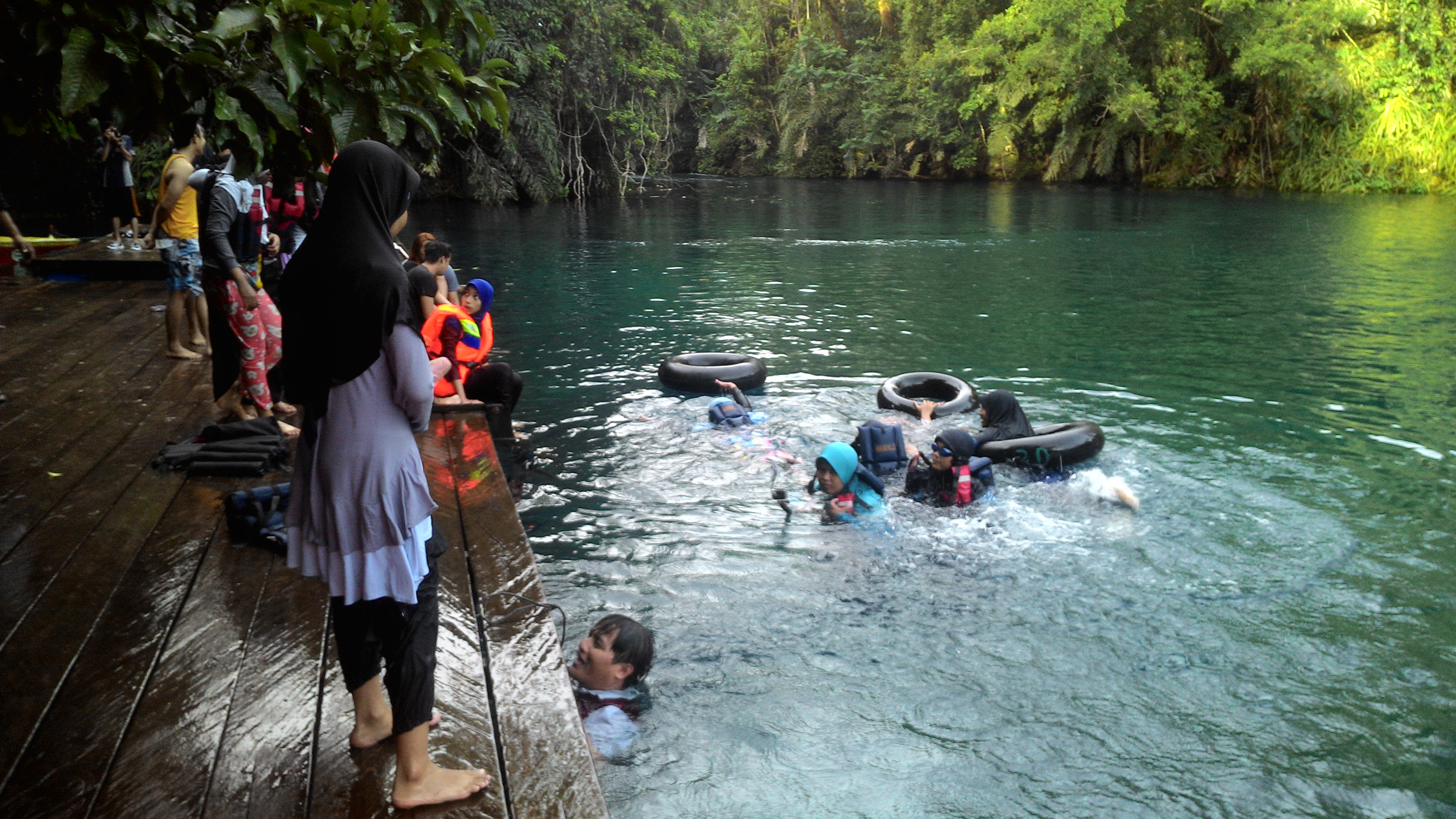 danau yang memiliki keunikan pada jenis air di dalamnya, di danau ini terdapat dua jenis air yang berbeda, di bagian atas adalah air tawar dan di bagian bawah adalah air asin.